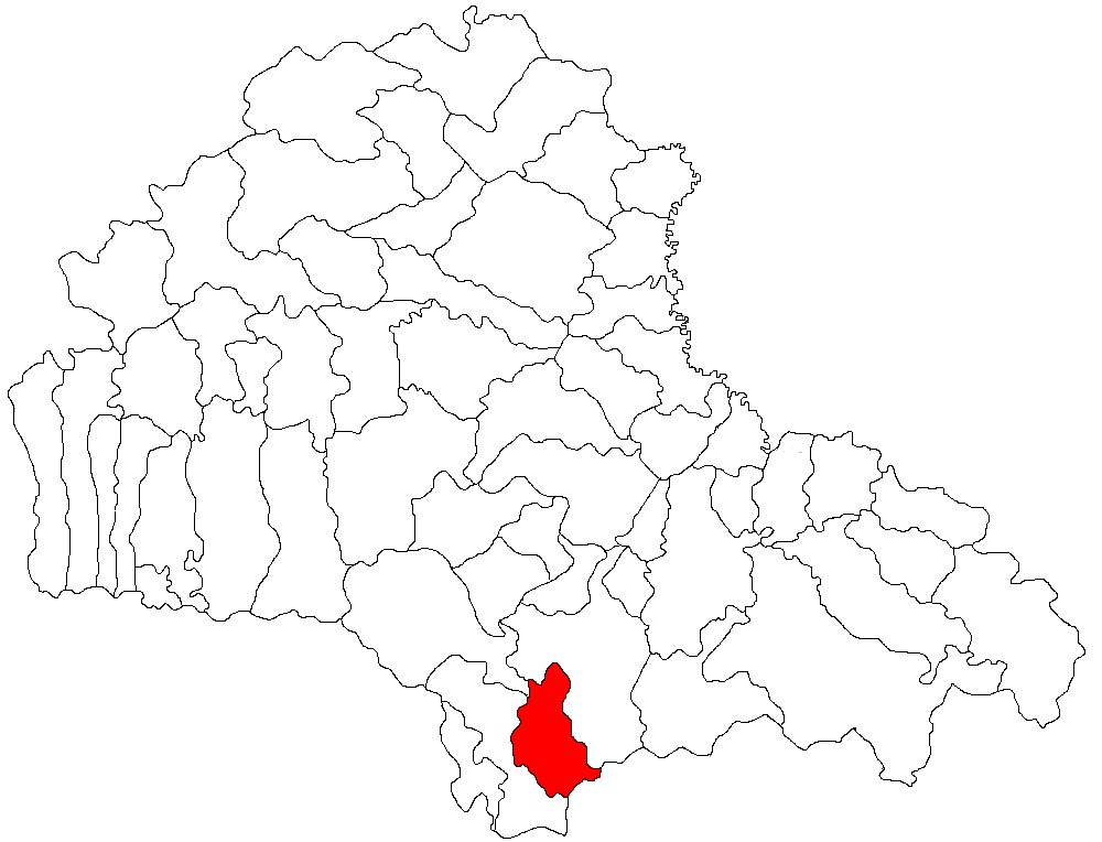 Categorie:Hărţi ale judeţului Braşov